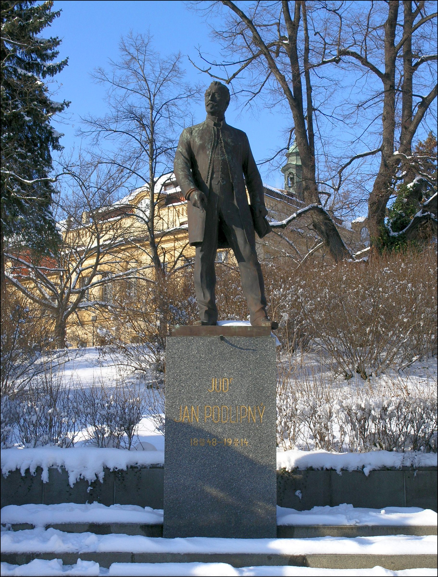 Praha, Libeň - socha Jan Podlipného (1848-1914) v ulici Zenklova